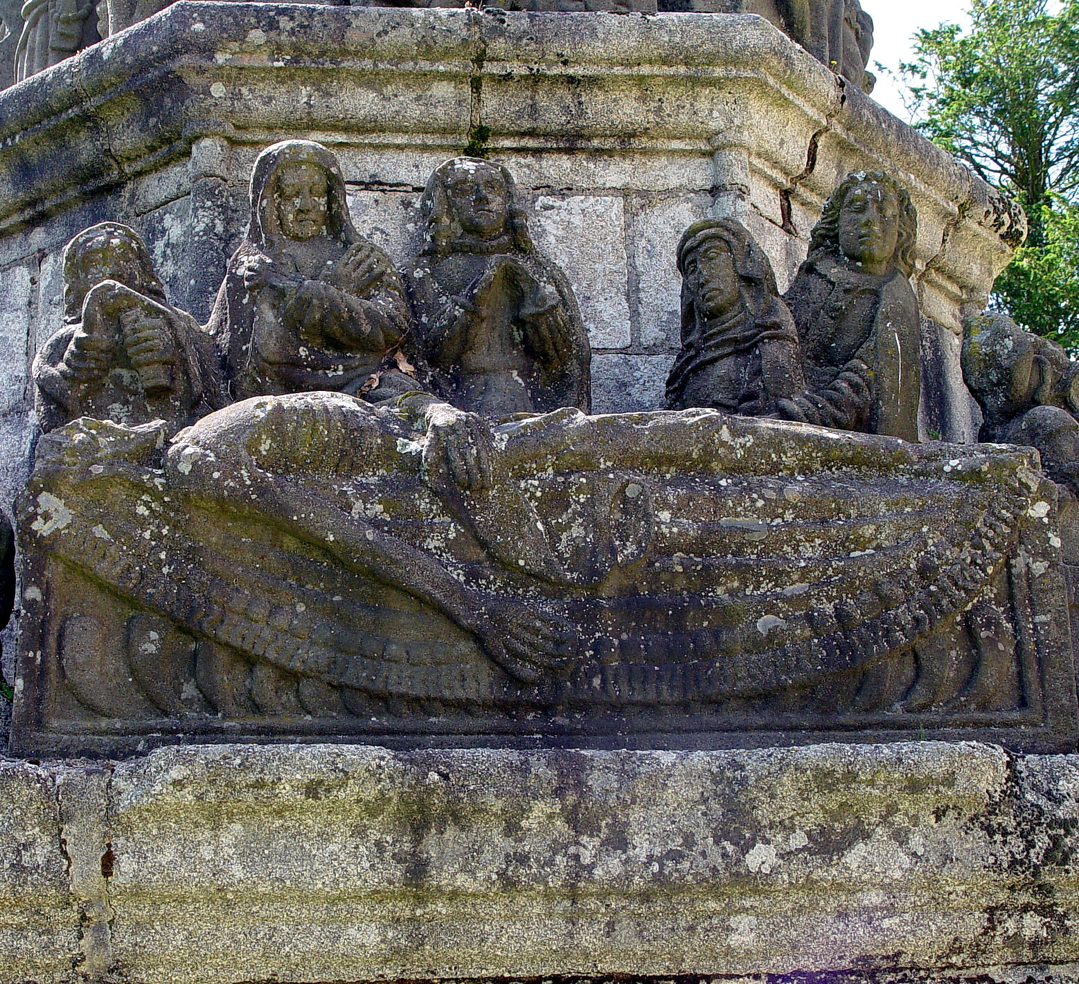 Calvaire in Kergrist-Moelou (Bretagne, Cotes d'Armor), Detail: Grablegung Christi